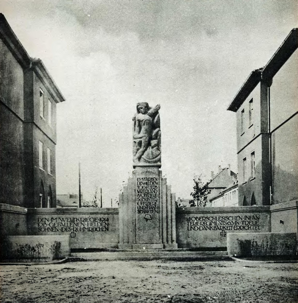 Gefallenendekmal in Oppeln in Oberschlesien.